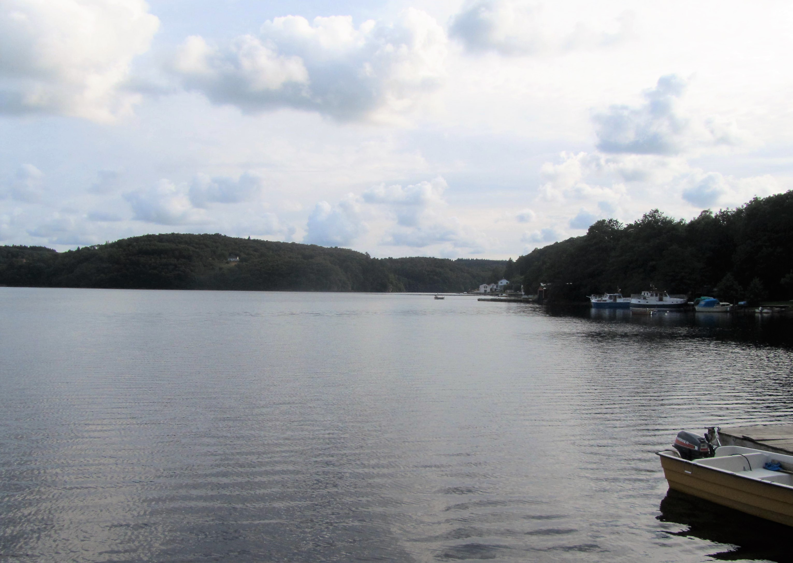 Helvikfjorden set mod Syd fra campingpladsen på vestsiden